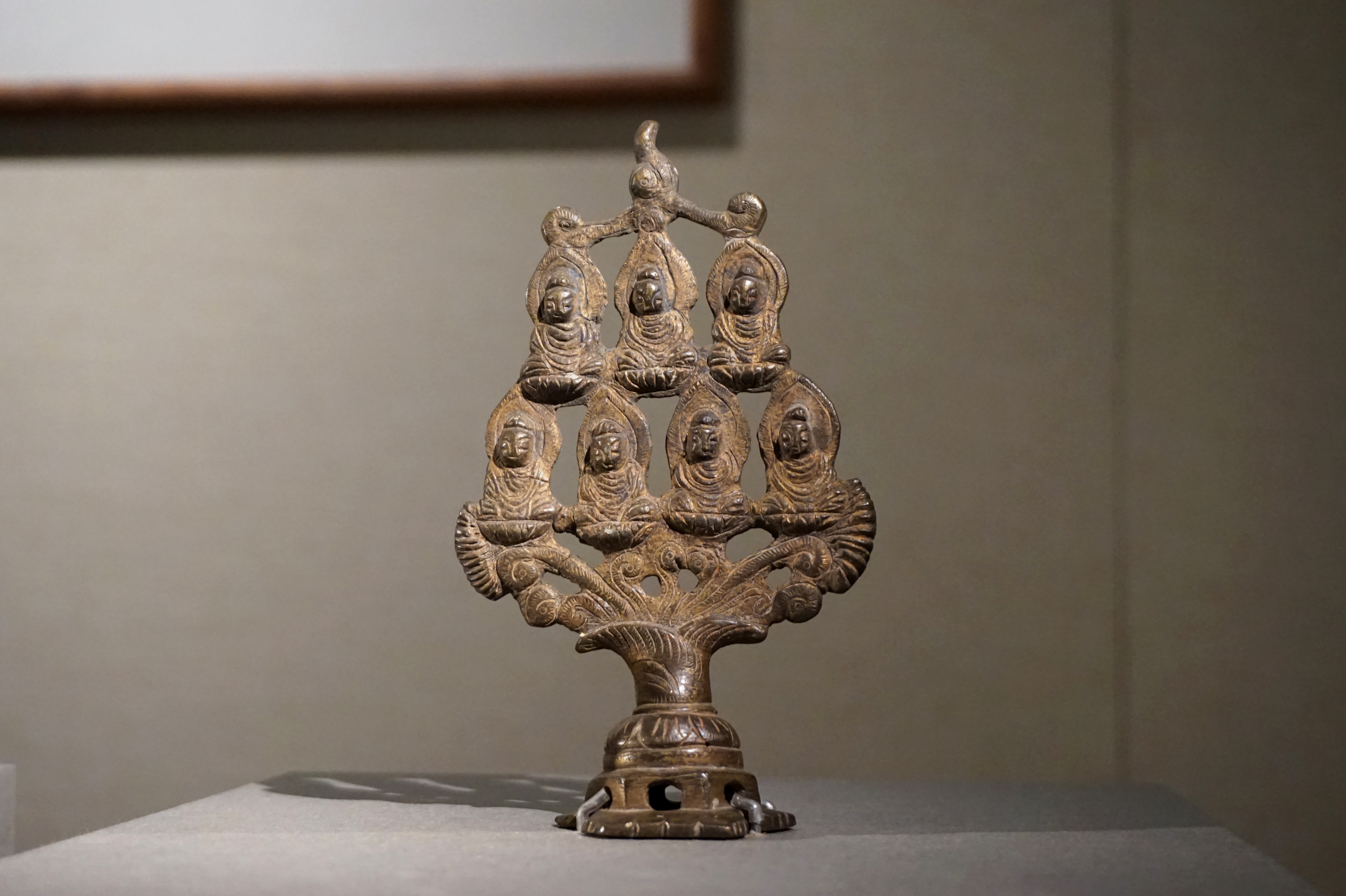 唐铜七佛造像。杭州西湖出土，浙江省博物馆藏。